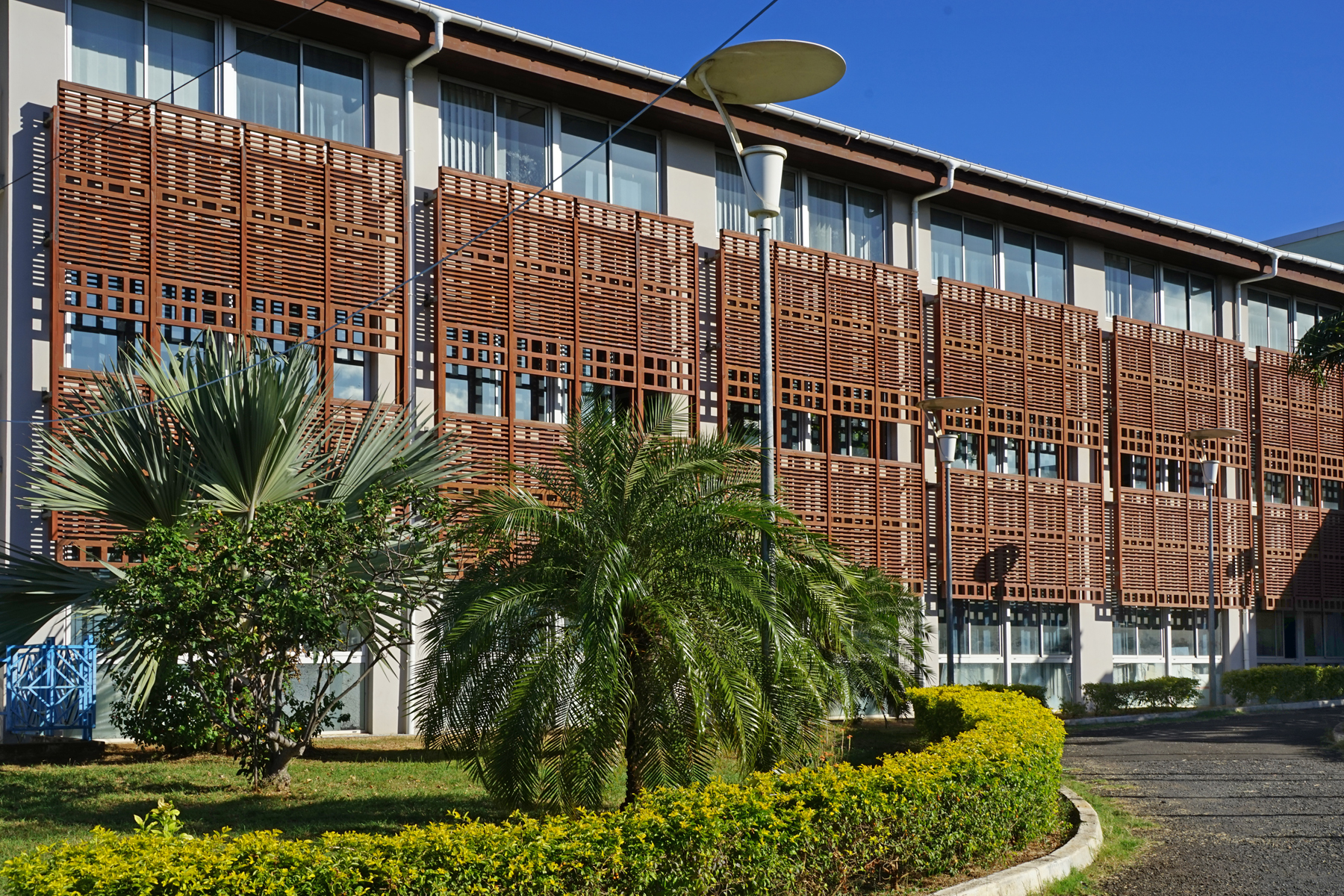 Mayotte est une région ultrapériphérique (RUP) de l'Europe, l'instrument financier de la coopération entre Mayotte et l'UE est le fonds européen de développement (FED) Le conseil départemental de Mayotte